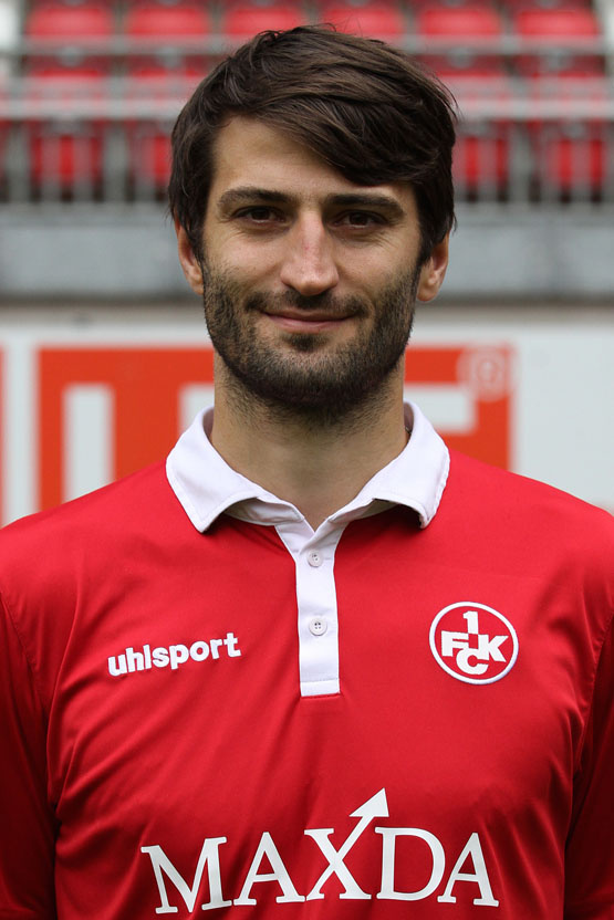 Markus Karl